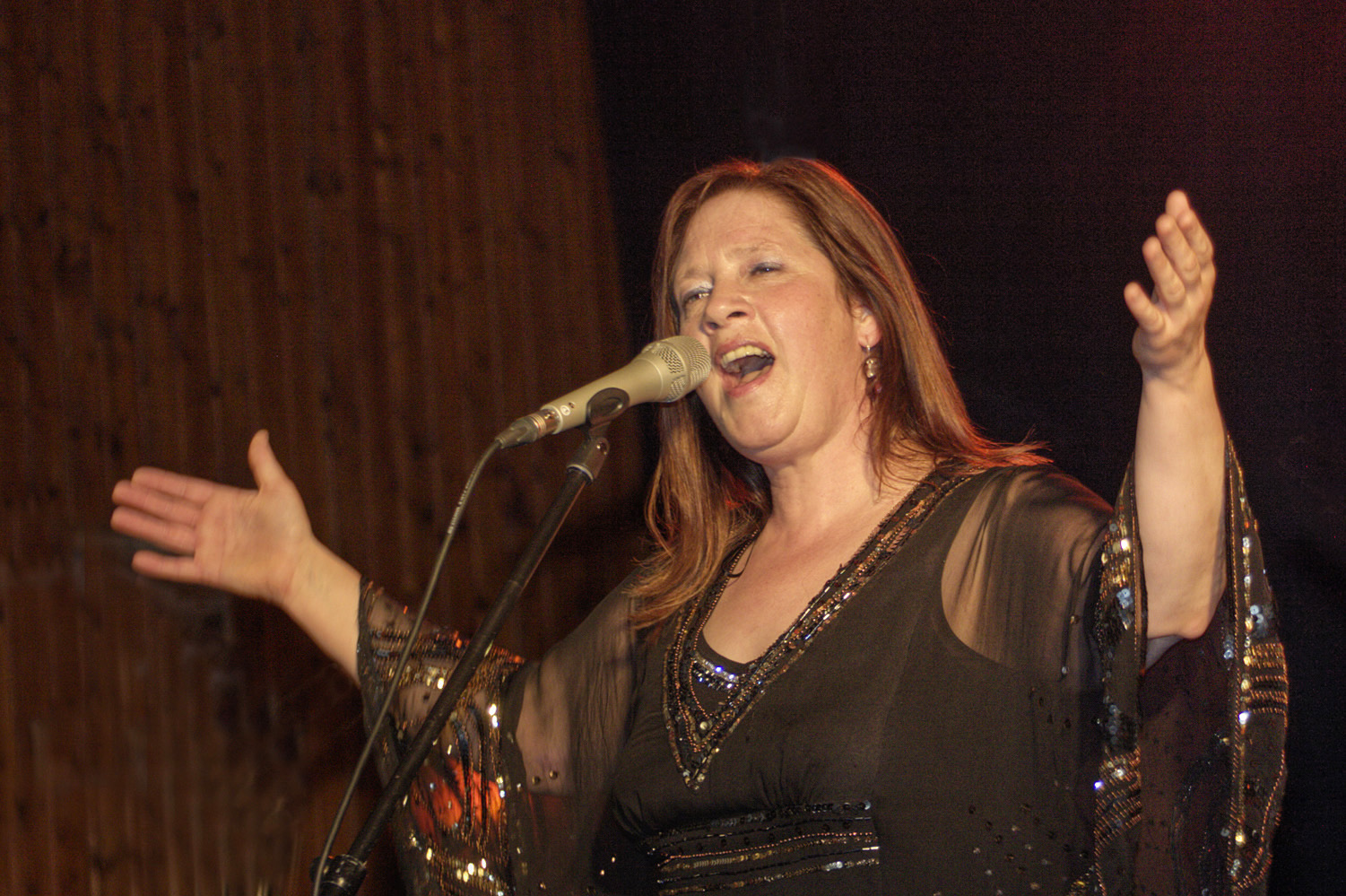 Kathy Kelly (* 6. März 1963 in Leominster, Massachusetts/USA als Kathleen Anne Kelly) ist die zweitälteste Tochter der Kelly Family, von der sie sich Ende 1999 trennte, um seit 2001 als Solomusikerin zu arbeiten.